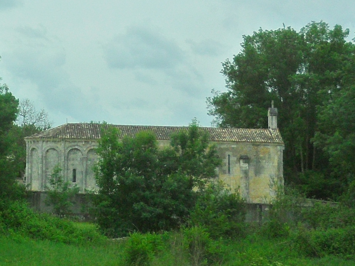 L'église de Saint-Martin-d'Ary